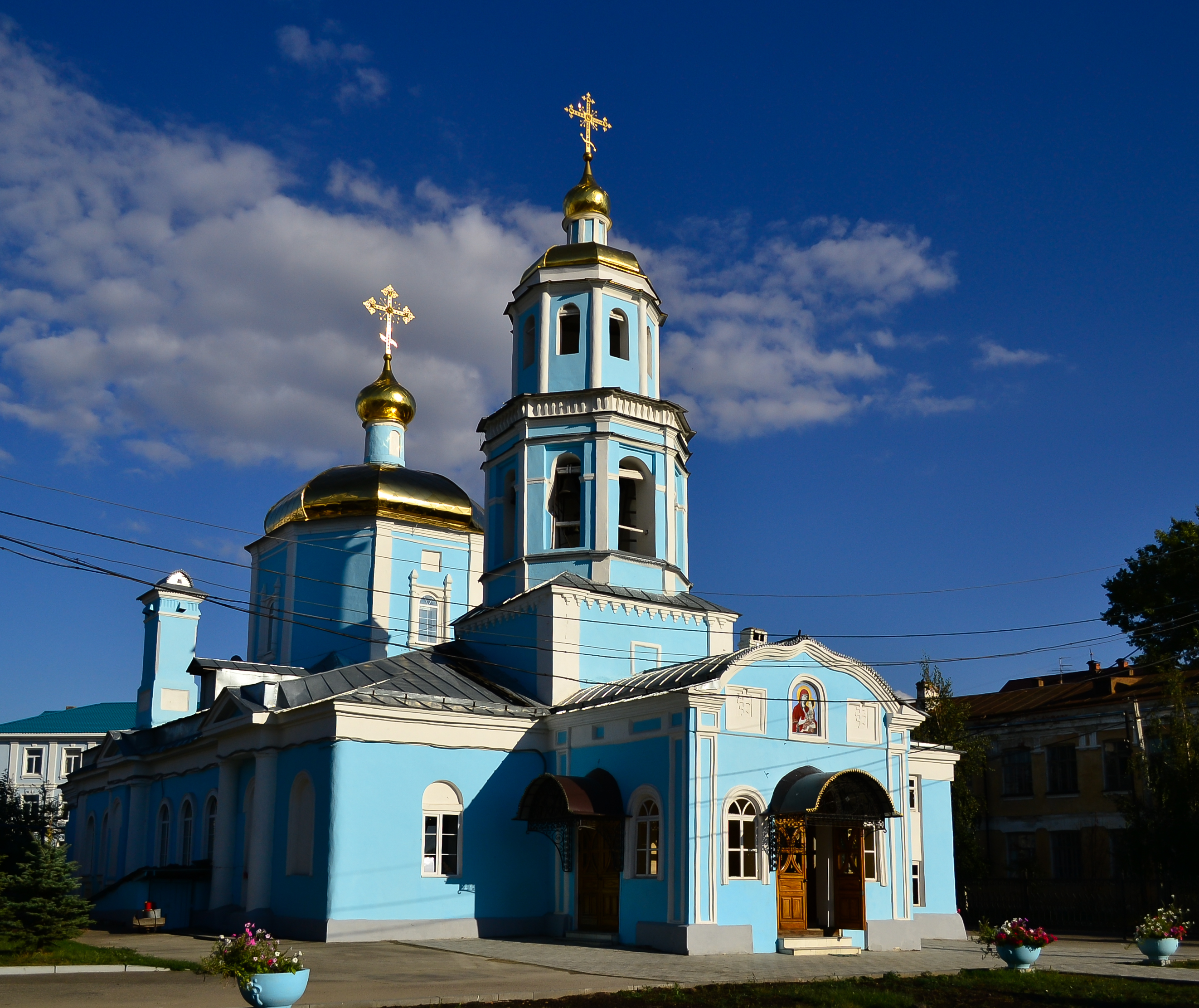 первая церковь Старо-Татарской слободы города